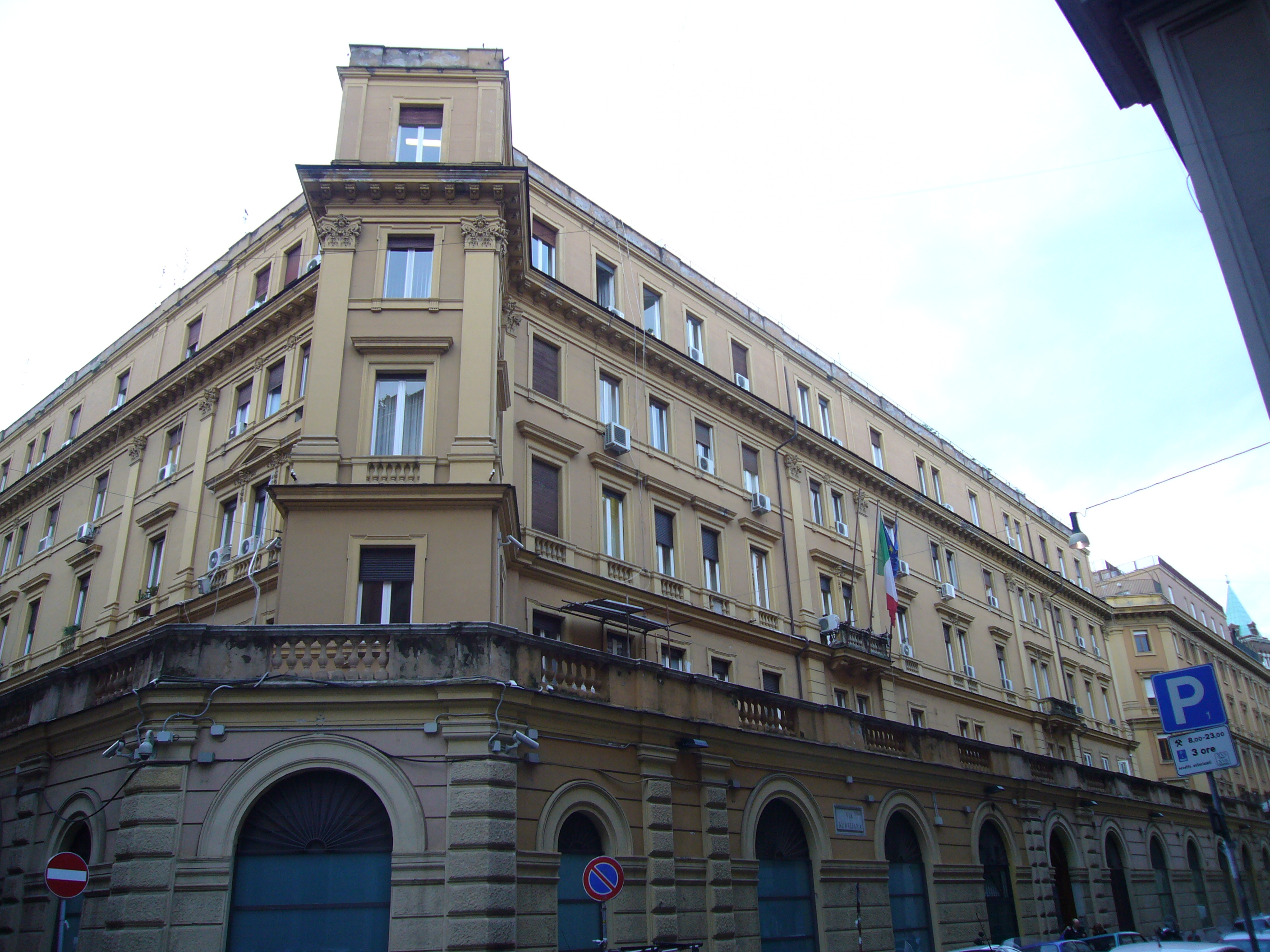 Roma, Ministero del Lavoro (via Aureliana angolo via Flavia)